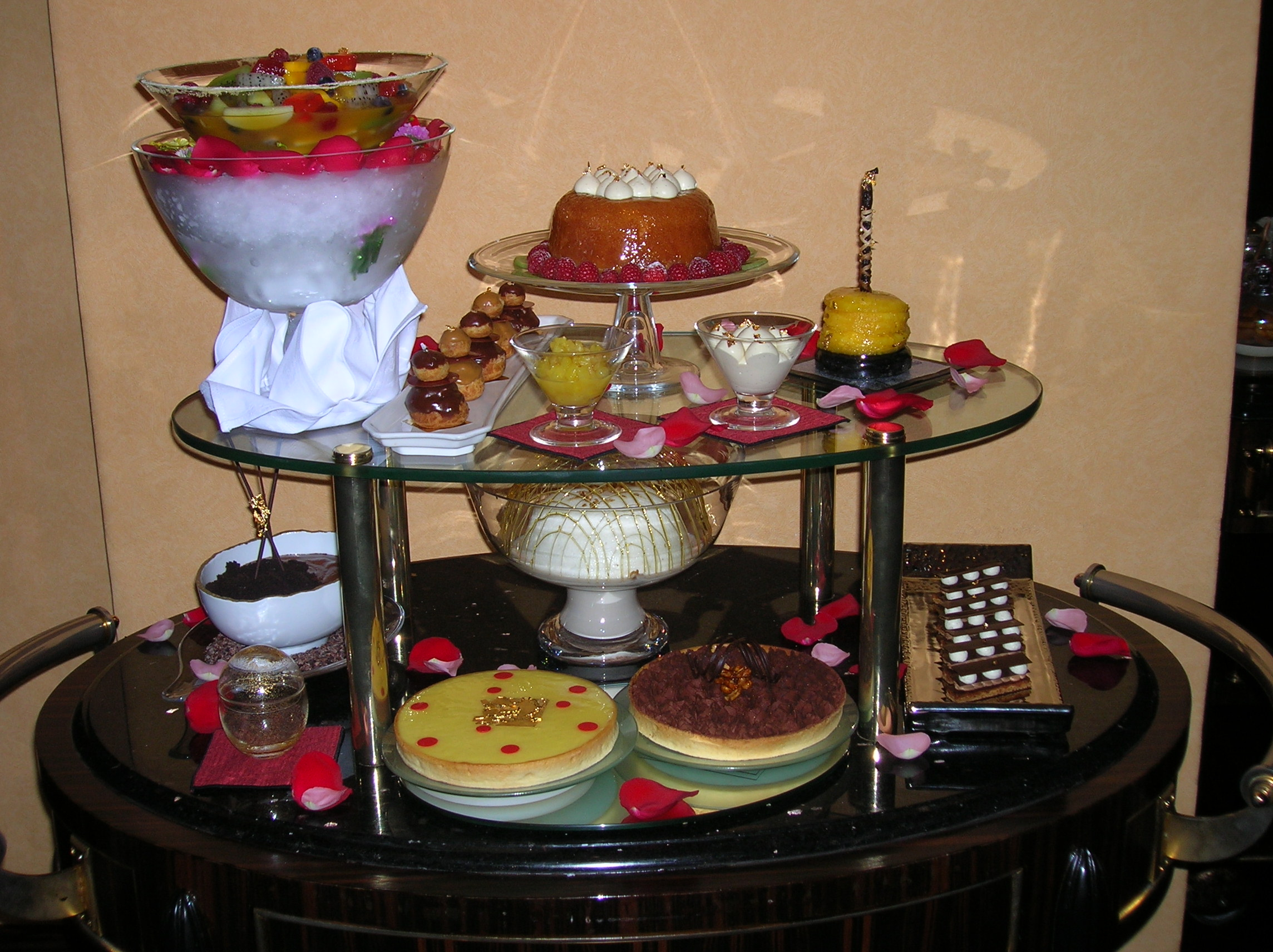 Robuchon a Galera Macau